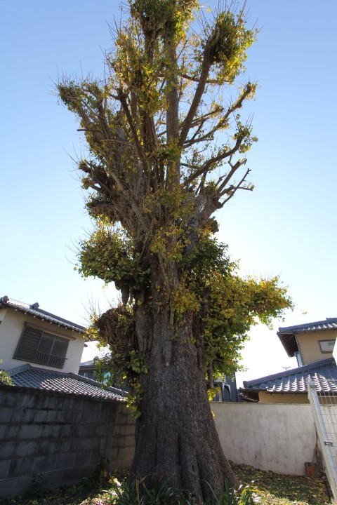 静岡県沼津市。大泉寺銀杏観音